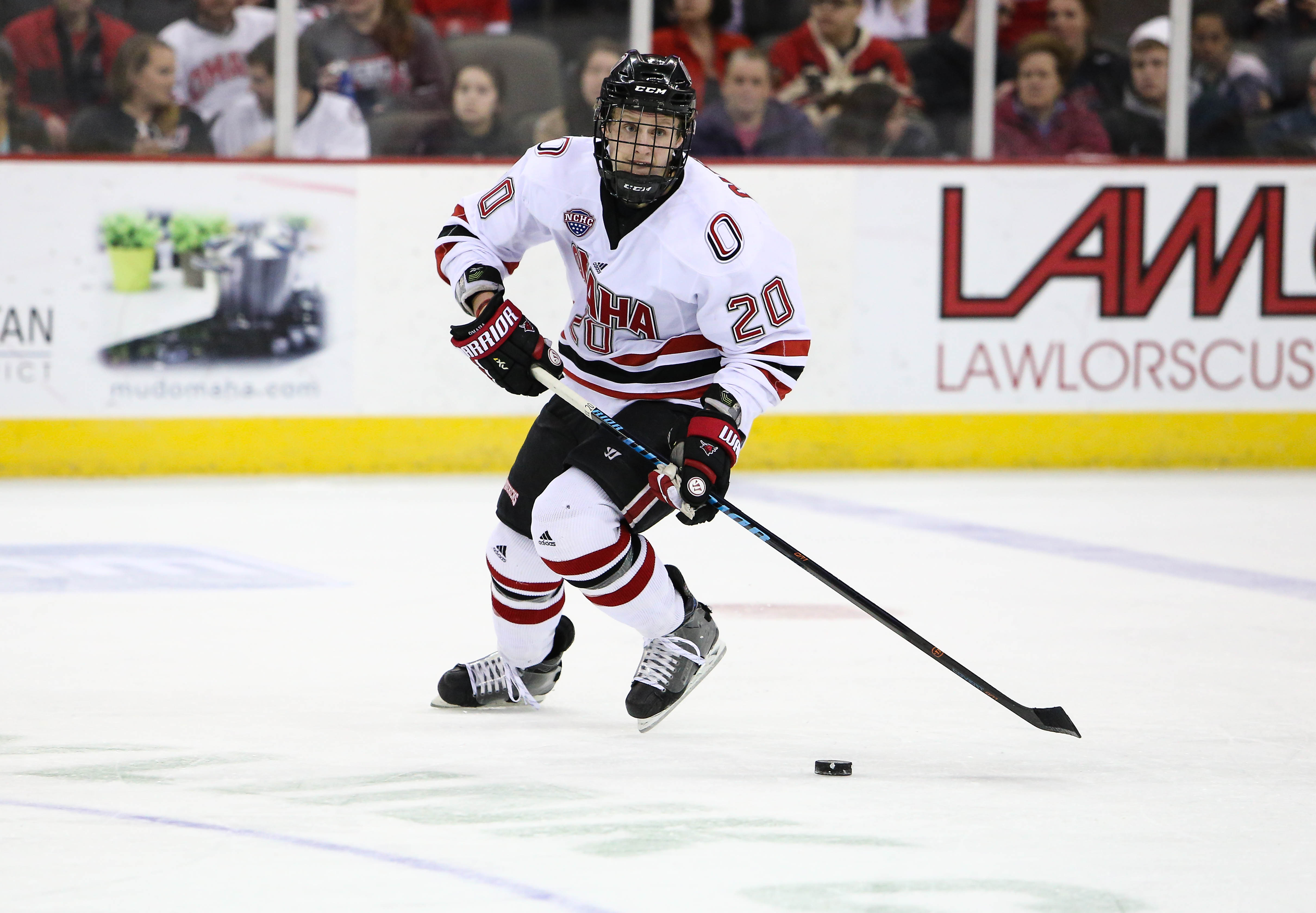 Minda Haas | 2015